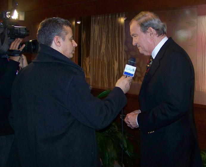 Pat Buchanan being interviewed in Manchester, NH